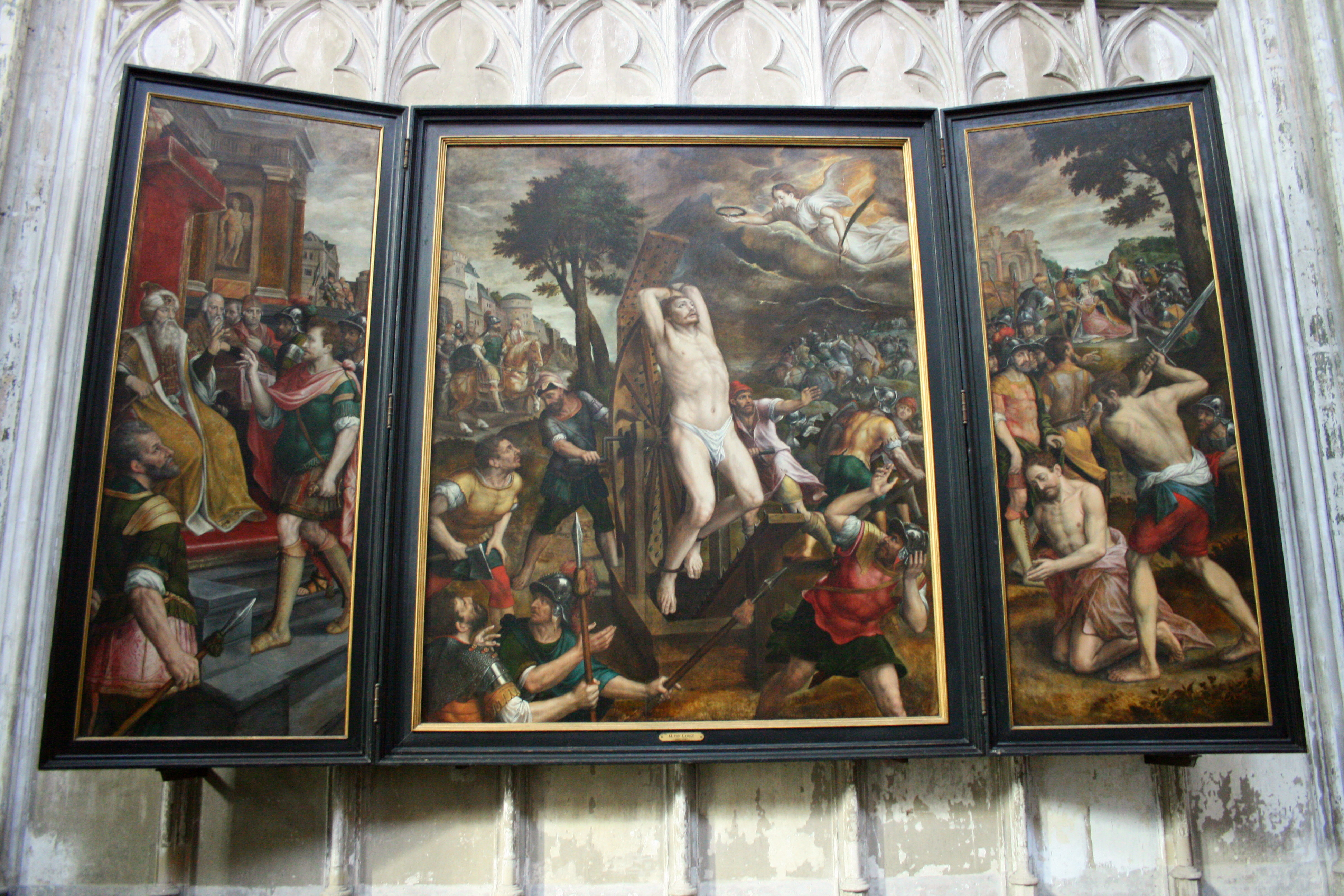 Sint-Romboutskathedraal in Mechelen, provincie Antwerpen, België. Schilderij "De marteling van Sint-Joris" door Michiel Coxcie in de koormomgang